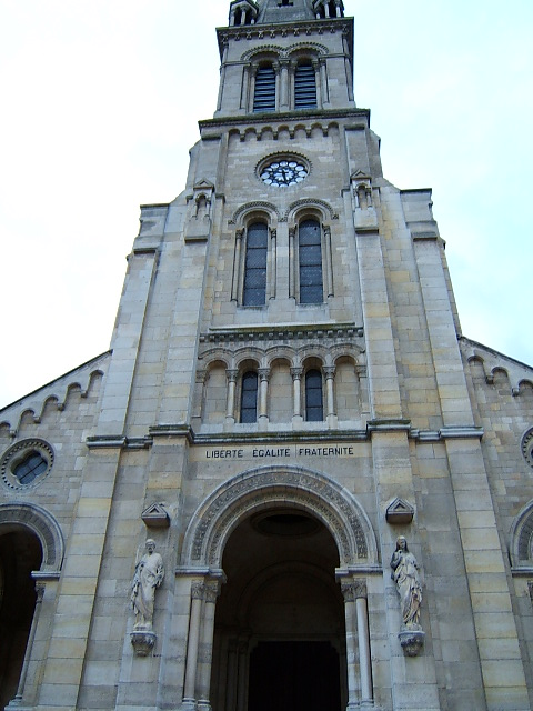 photo par l'auteur de la basilique d'argenteuil